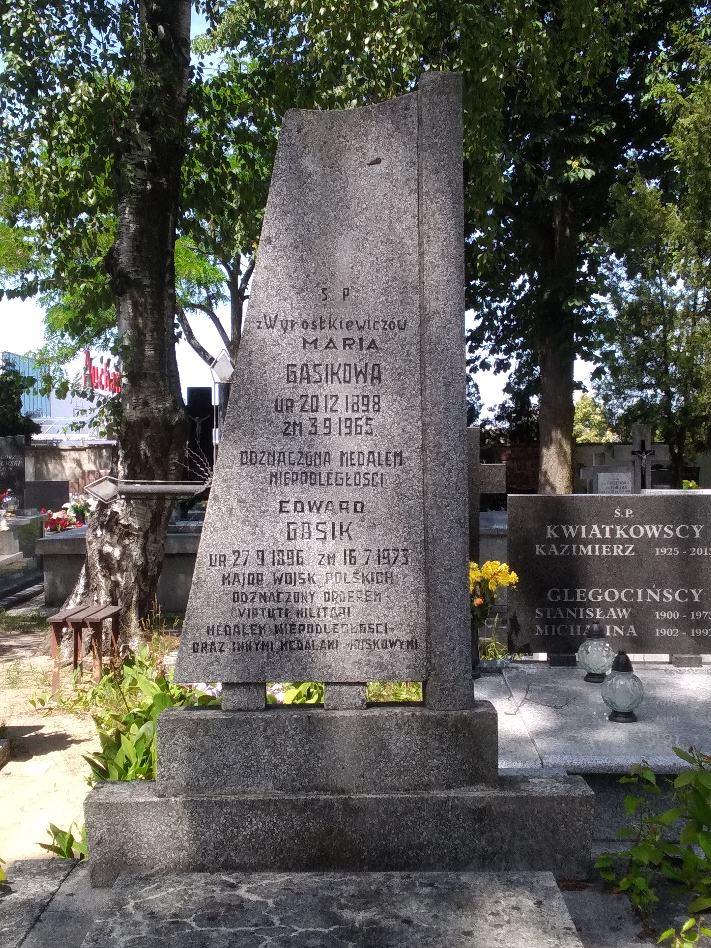 Płyta nagrobna mjr. Edwarda Gasika i jego żony Marii - cmentarz komunalny we Włocławku.